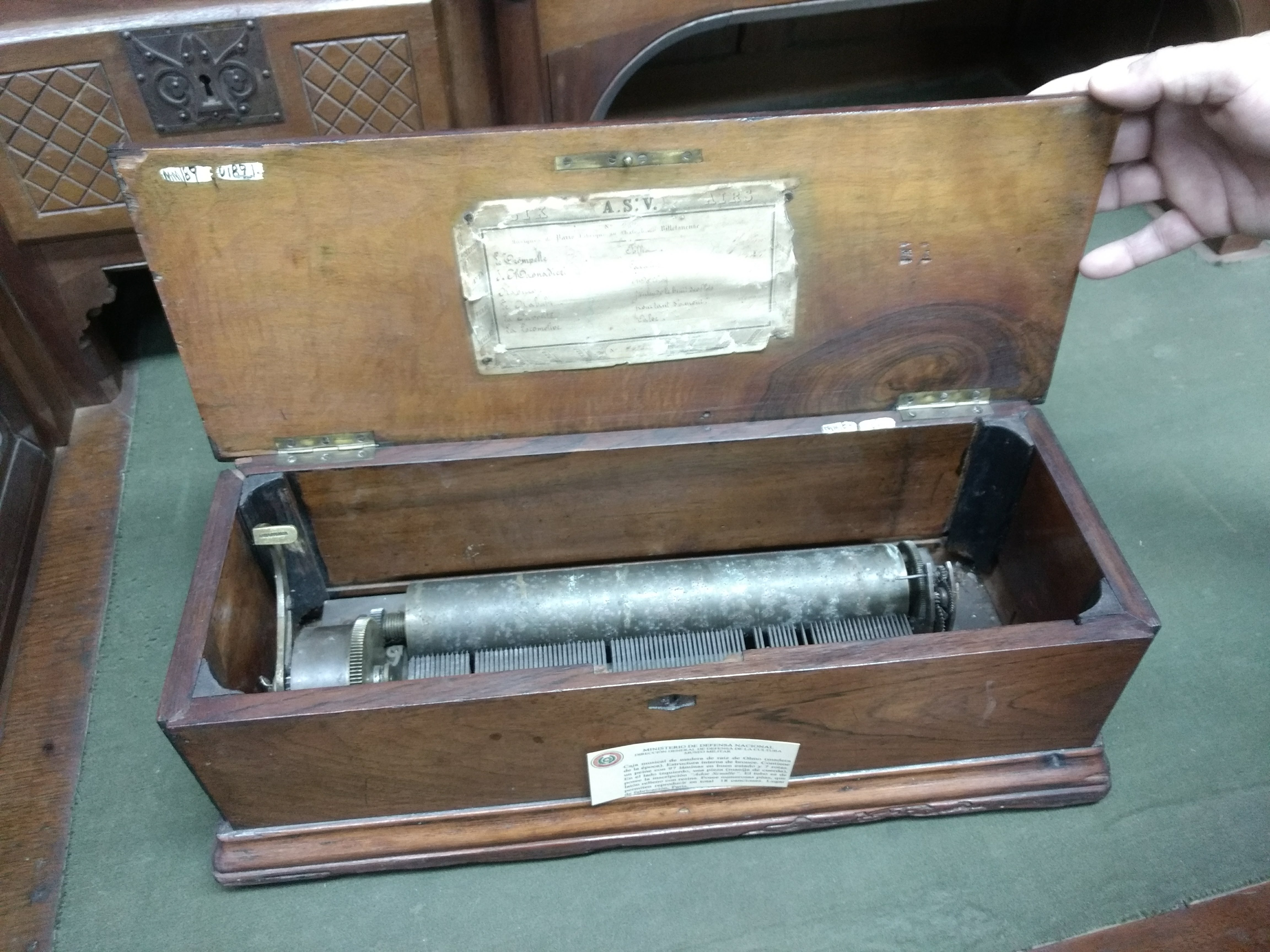 Caja musical perteneciente a madame Elisa Lynch, devuelta por el Gobierno argentino (Museo Militar del Paraguay)